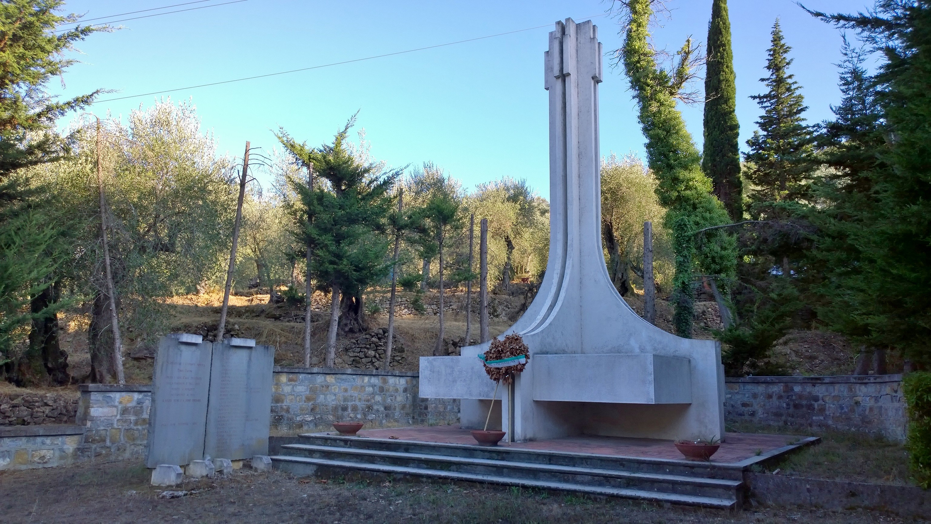 Pietrabruna, Ortsteil Torre Paponi. Das Denkmal zum Gedenken an die Ermordung von 28 Menschen des Ortes zwischen dem 14. und 16. Dezember 1944 durch die deutsche Wehrmacht. (siehe auch